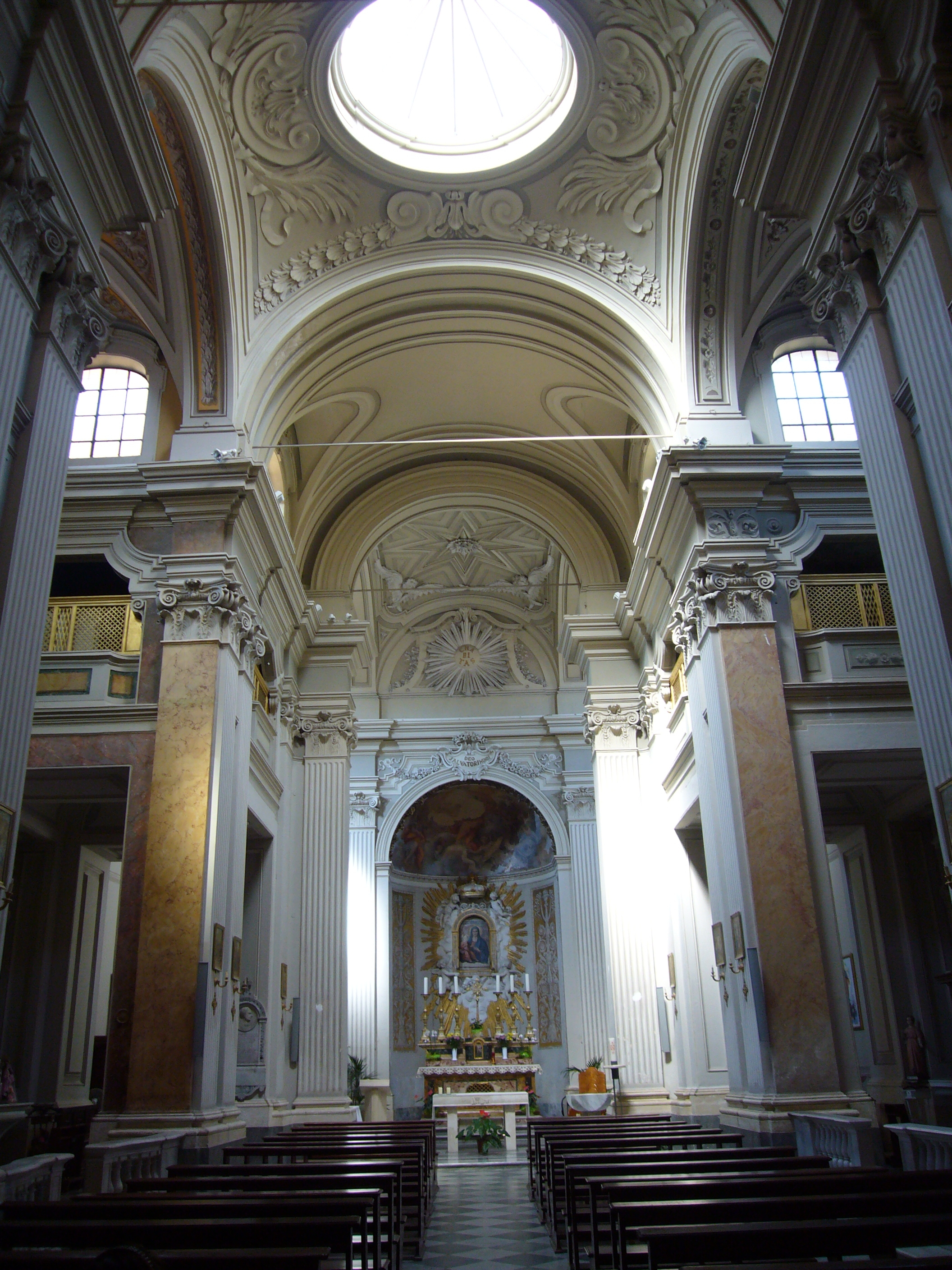 Roma, santa Maria della Luce, interno